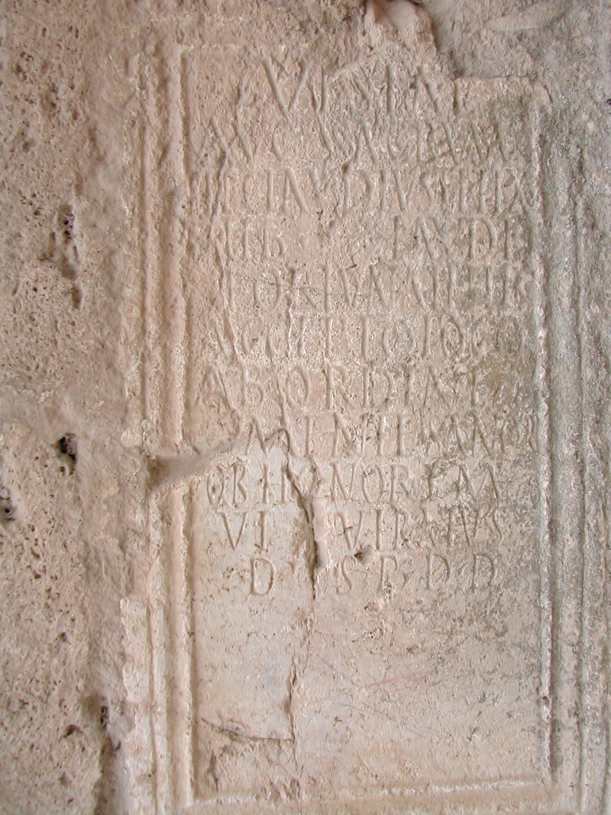 Pedestal romano usado como sillar en la iglesia del convento de Santo Domingo de La Guardia de Jaén. Corresponde con la inscripción votiva CIL II 3378 = CIL II5 3, cuyo texto dice: VESTAE/ AVG(ustae) SACRVM/ TI(berius) CLAVDIVS FELIX/ TIB(eri) CLAVDI/ FORTVNATI LIB(ertus)/ ACCEPTO LOCO/ AB ORDINE/ MENTESANOR(um)/ OB HONOREM/ VI VIRATVS/ D(e) S(ua) P(ecunia) D(edit) D(edicavit).